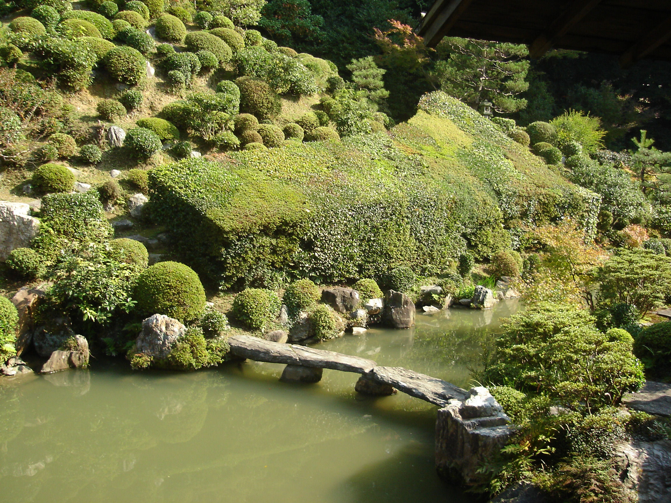 Chisyakuin teien